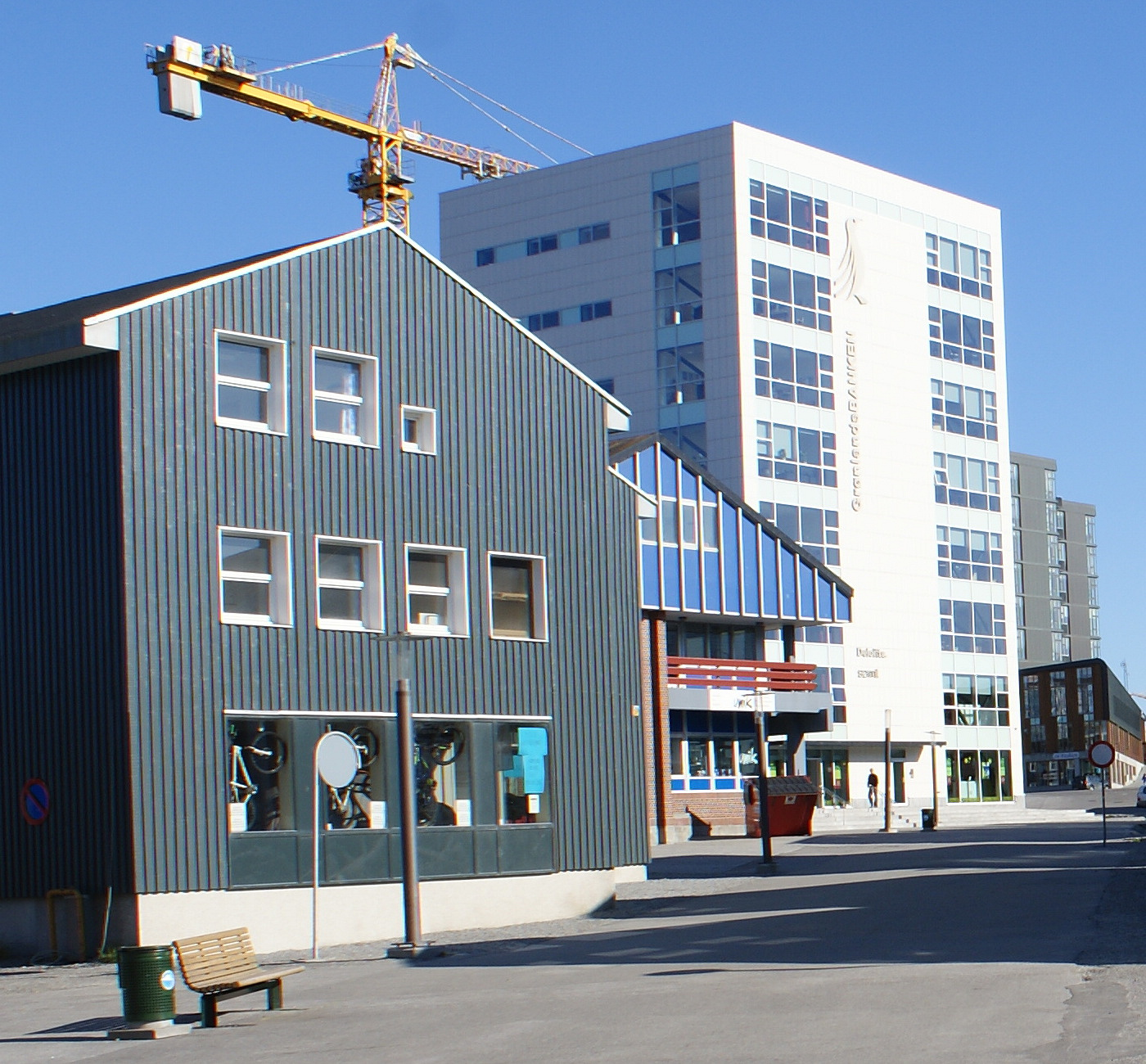 Bank of Greenland headquarters in Nuuk Centrum. Cropped.